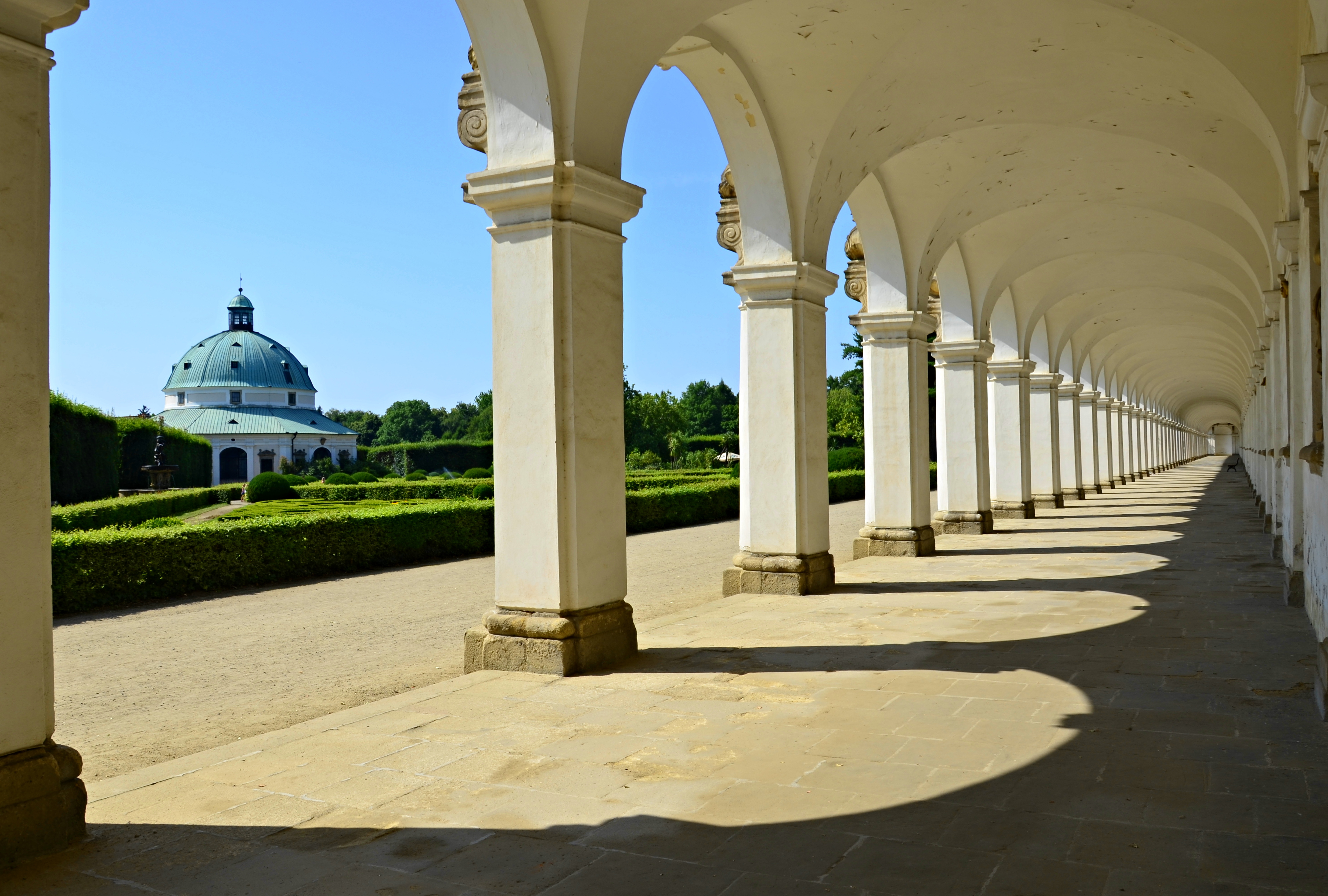 Park Květná zahrada (Kroměříž), Gen. Svobody, Kroměříž